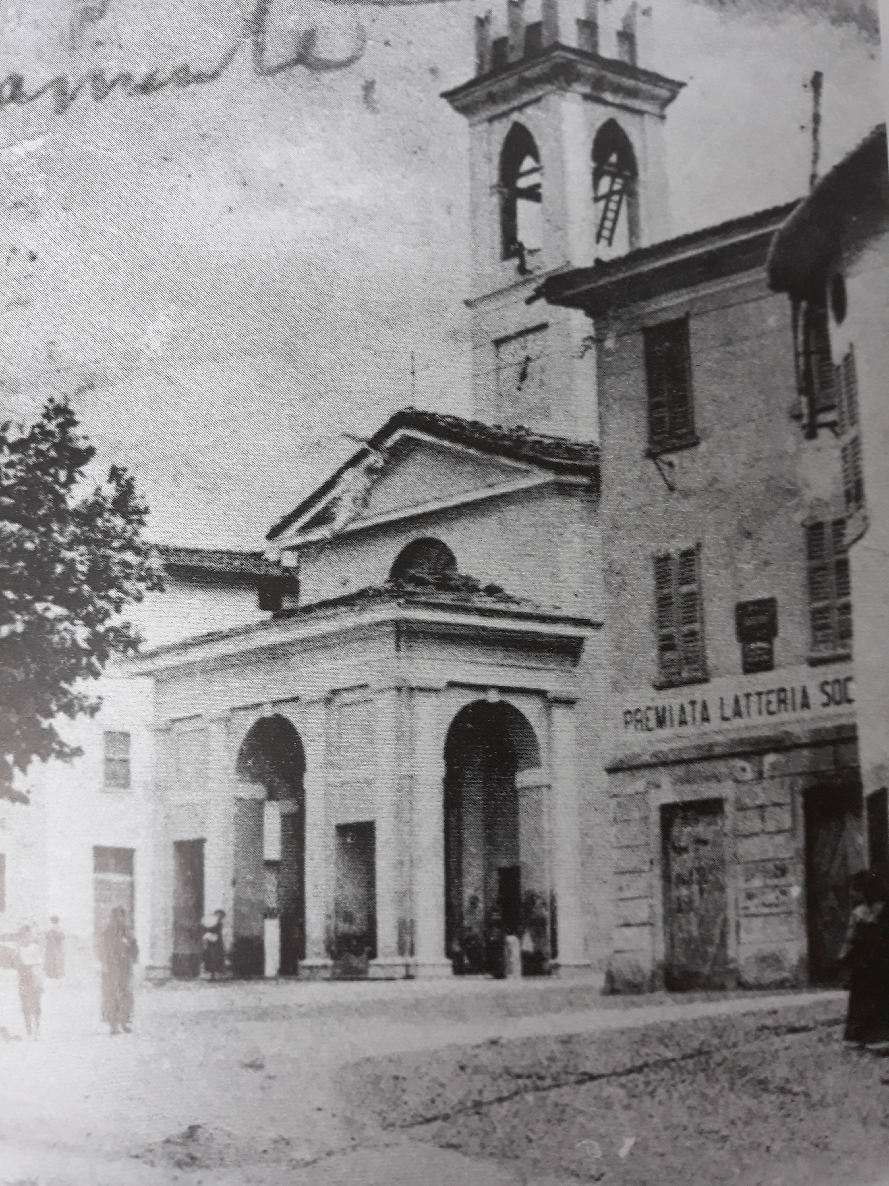 Piazza San Giorgio nell'Ottocento, quando ancora la Chiesa non era stata spostata più a nord